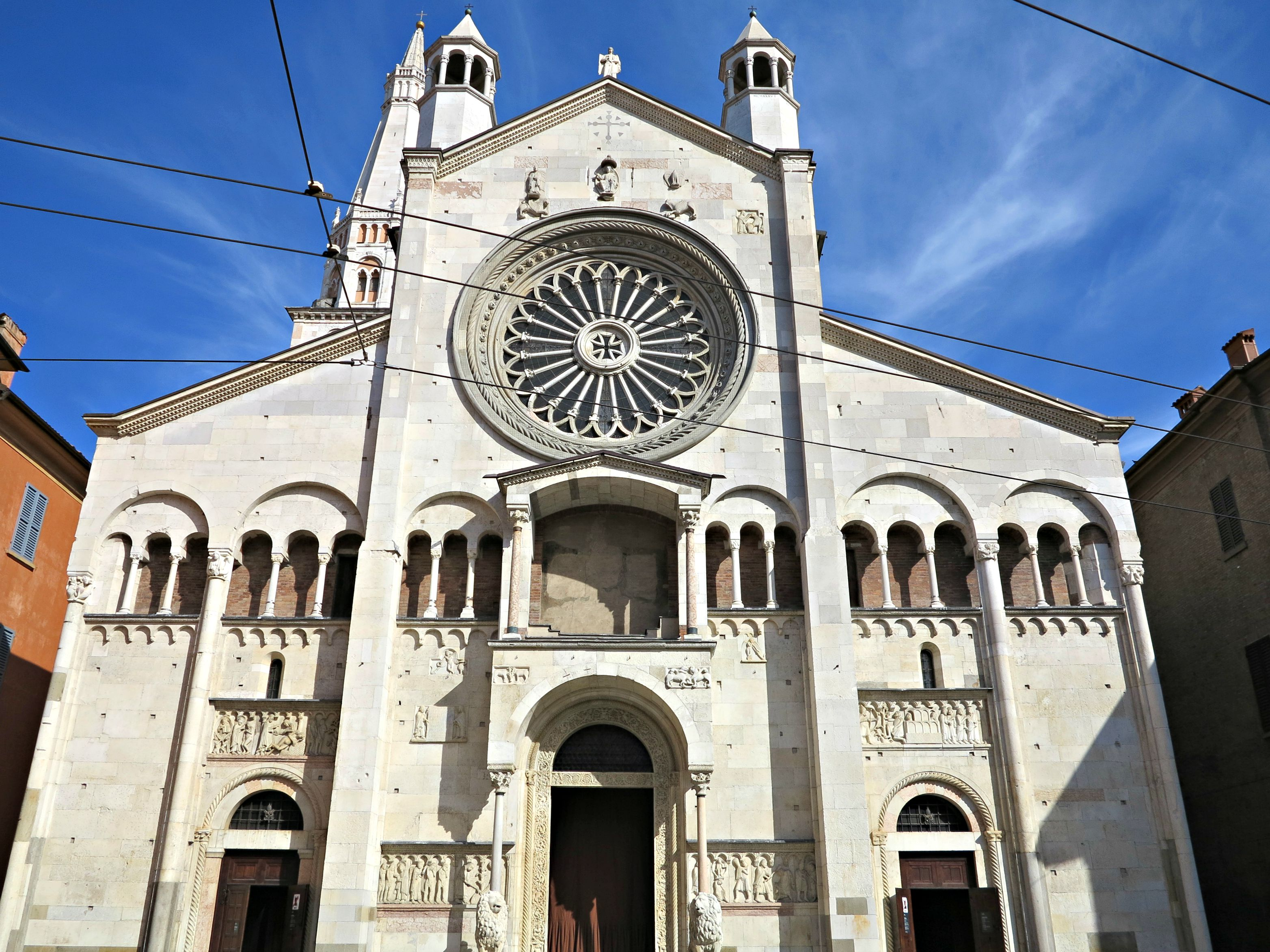 Duomo (solo esterni) This is a photo of a monument which is part of cultural heritage of Italy.